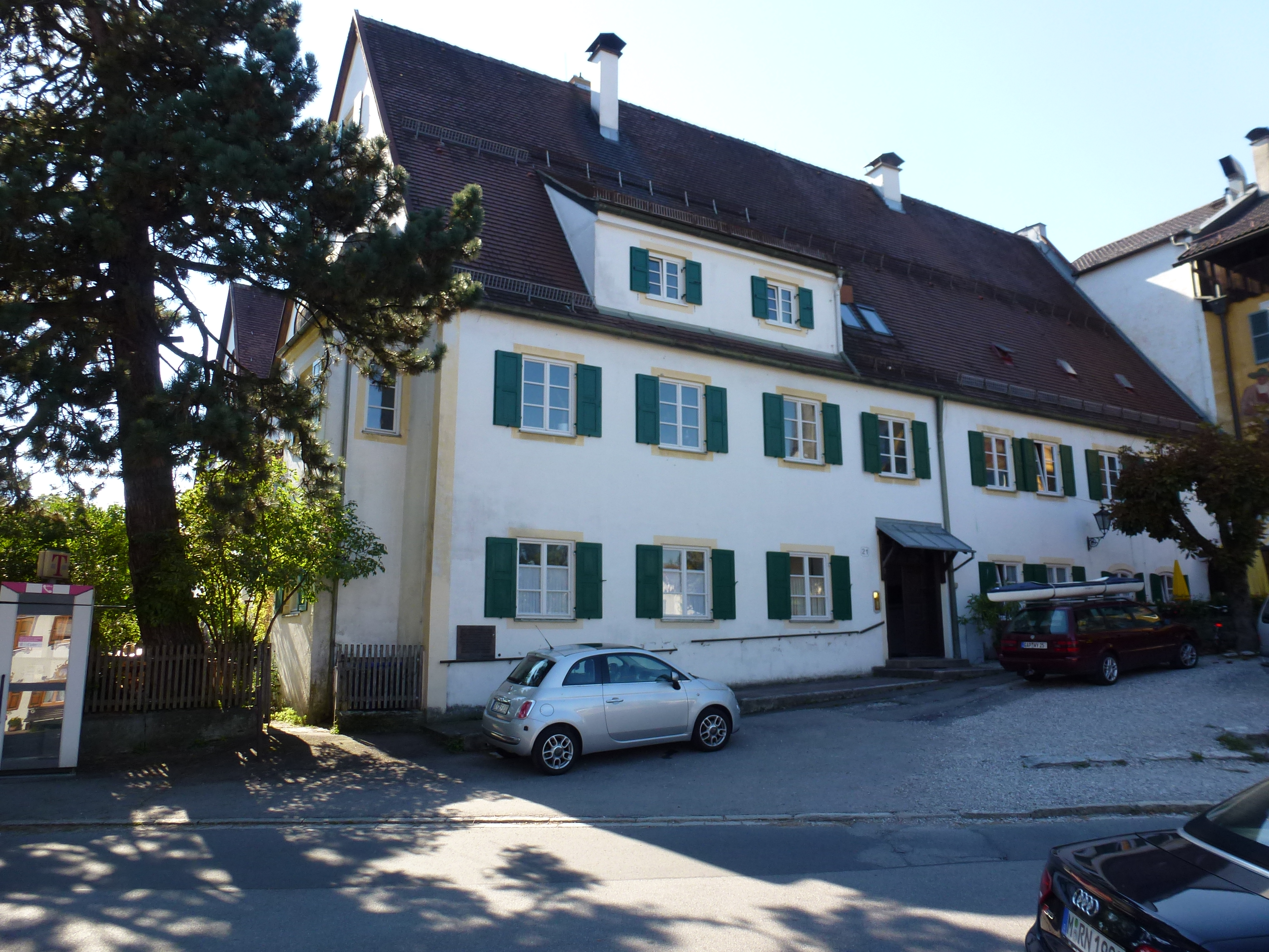 Ehemaliges Rentamt - Fürstenstraße 21, Garmisch-Partenkirchen